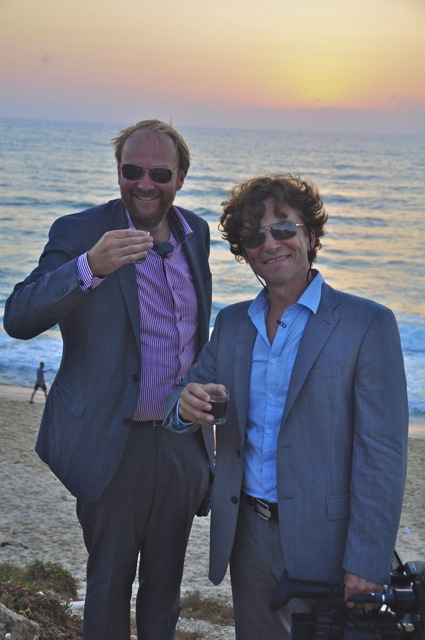 Nils & Ronny Gaza 2014, Ronny Kristoffersen til høyre